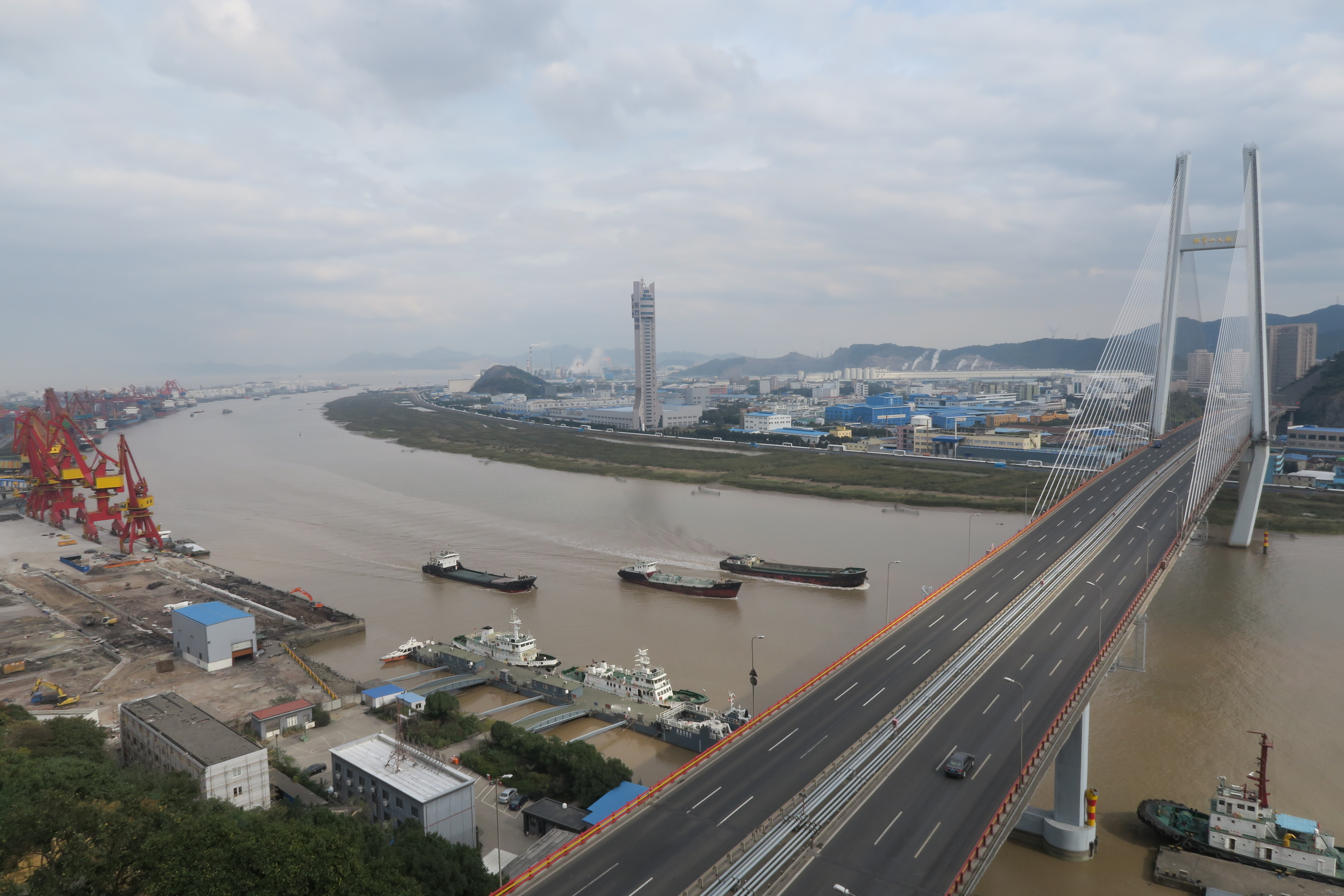 宁波甬江口和招宝山大桥